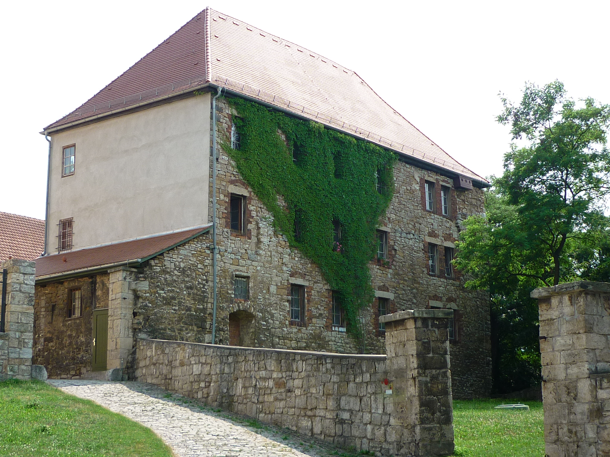 Schloss Apolda - Vitzthumbau